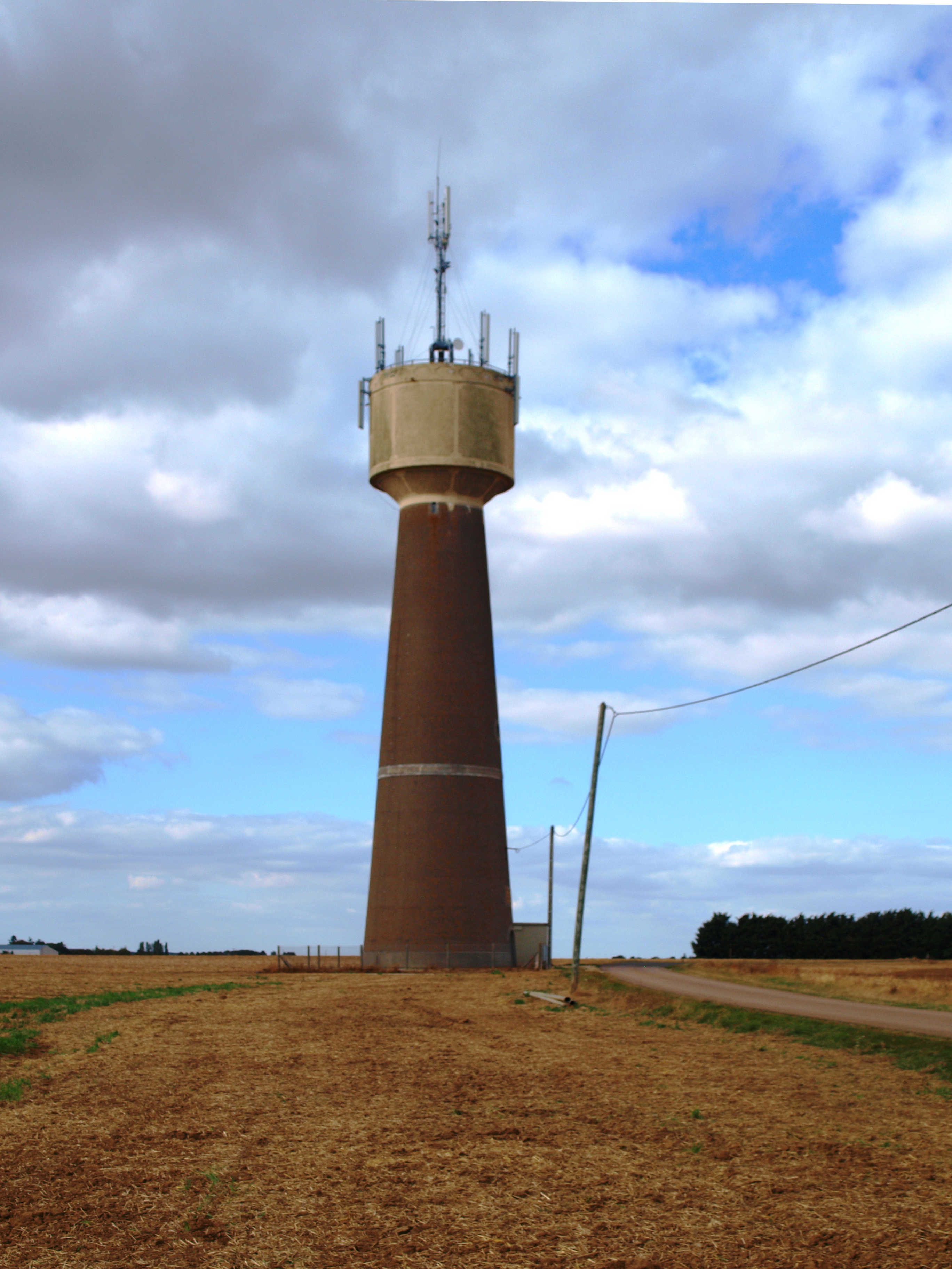 Villampuy (Eure-et-Loir) , le château d'eau